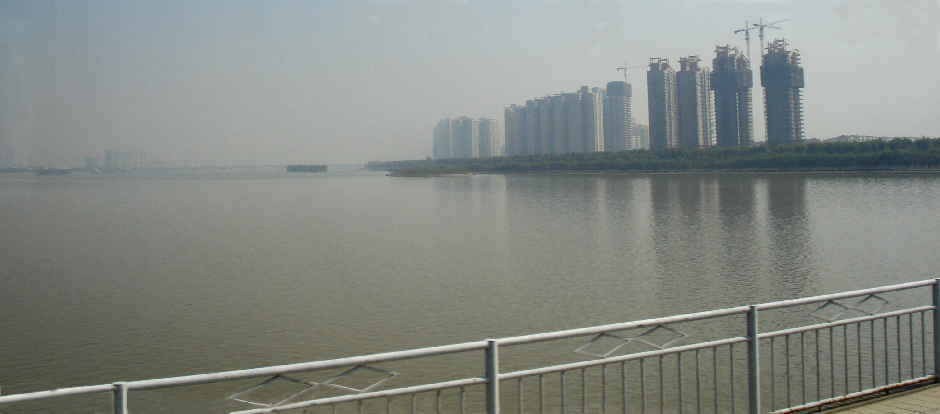 Luoyang, Chiny: most przez rzekę Luo He przed ujściem do Żółtej Rzeki (Huang He)